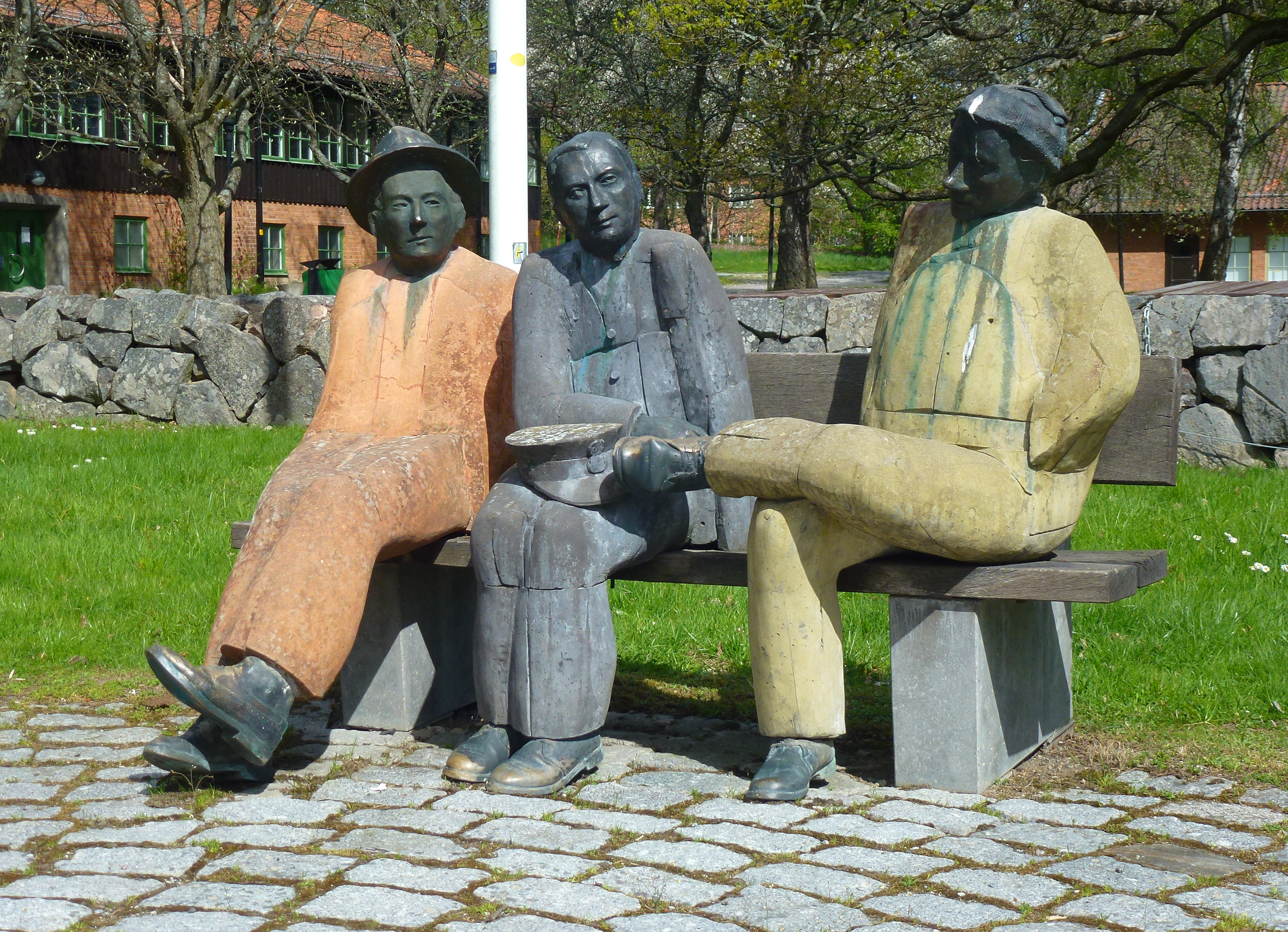 Samtal på en parkbänk. Bildsköne Bengtsson, konstapel Björk och Tumba-Tarzan. Betong, brons och trä, 1994. Staty vid Polishögskolan, Sörentorp. Mats Eriksson (1945-)